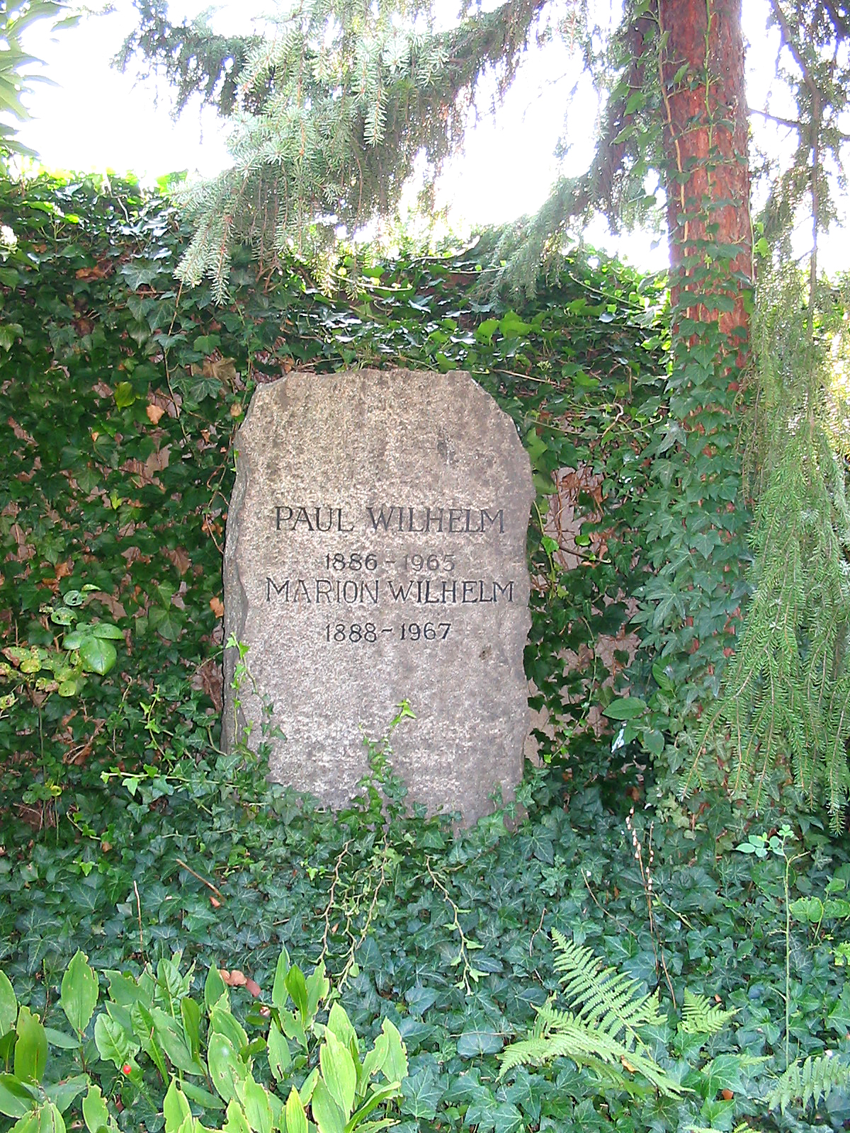 Friedhof Naundorf-Zitzschewig, Grabmal Paul Wilhelm